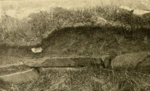 Vestiges d'une habitation à Tingimuit, baie de Tasussiak, fjord de Sermilik (établissment de l'Est)